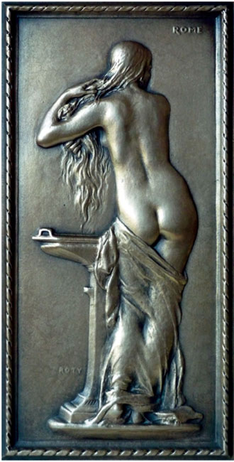 Oscar Roty: Frau bei der Morgentoilette, der Körper der beinahe unbekleideten Dame im Badezimmer vor der auf ein Waschbecken reduzierten, beinahe impressionistisch reduzierten Umgebung ...